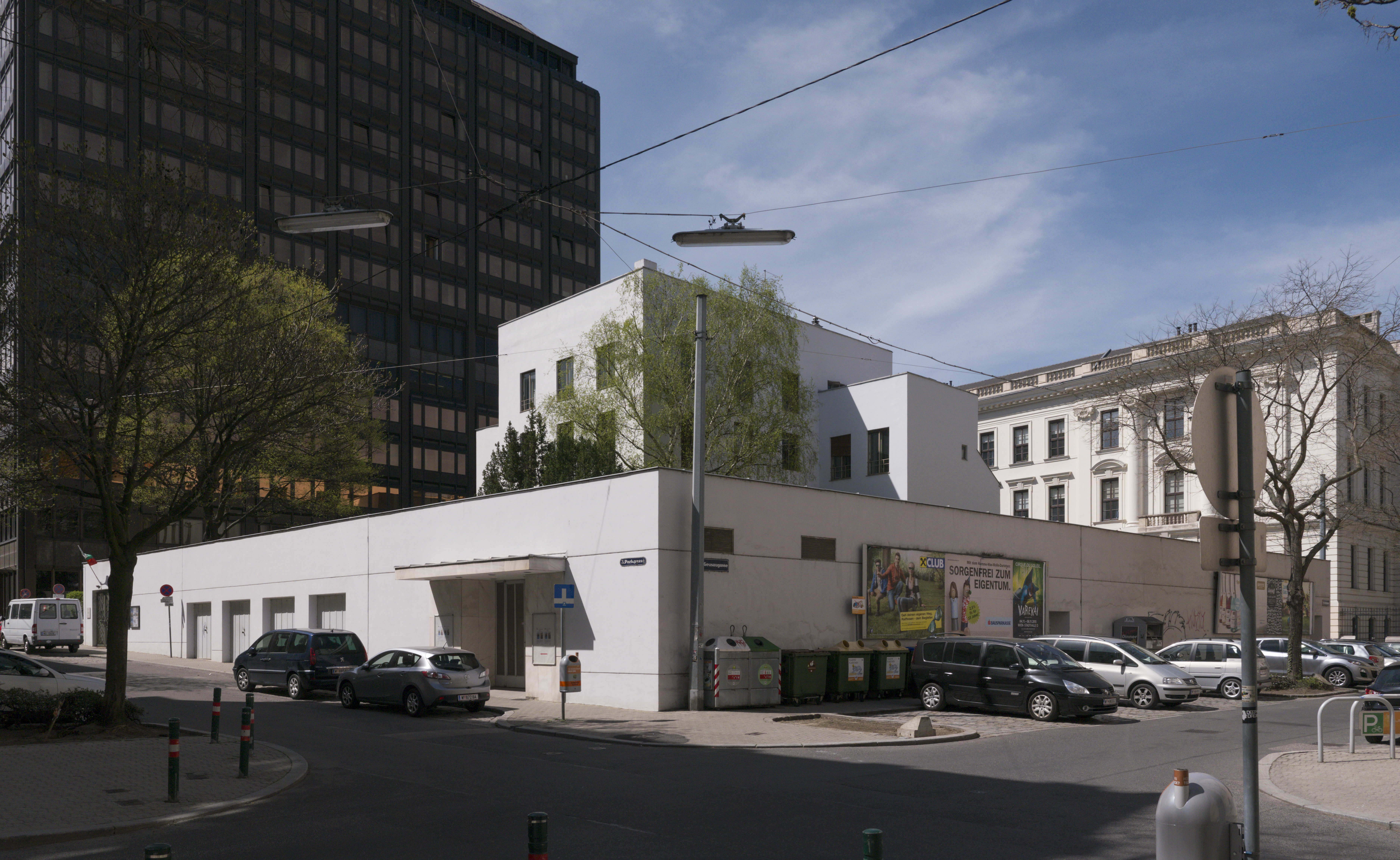 Wohnhaus, Haus Stonborough-Wittgenstein